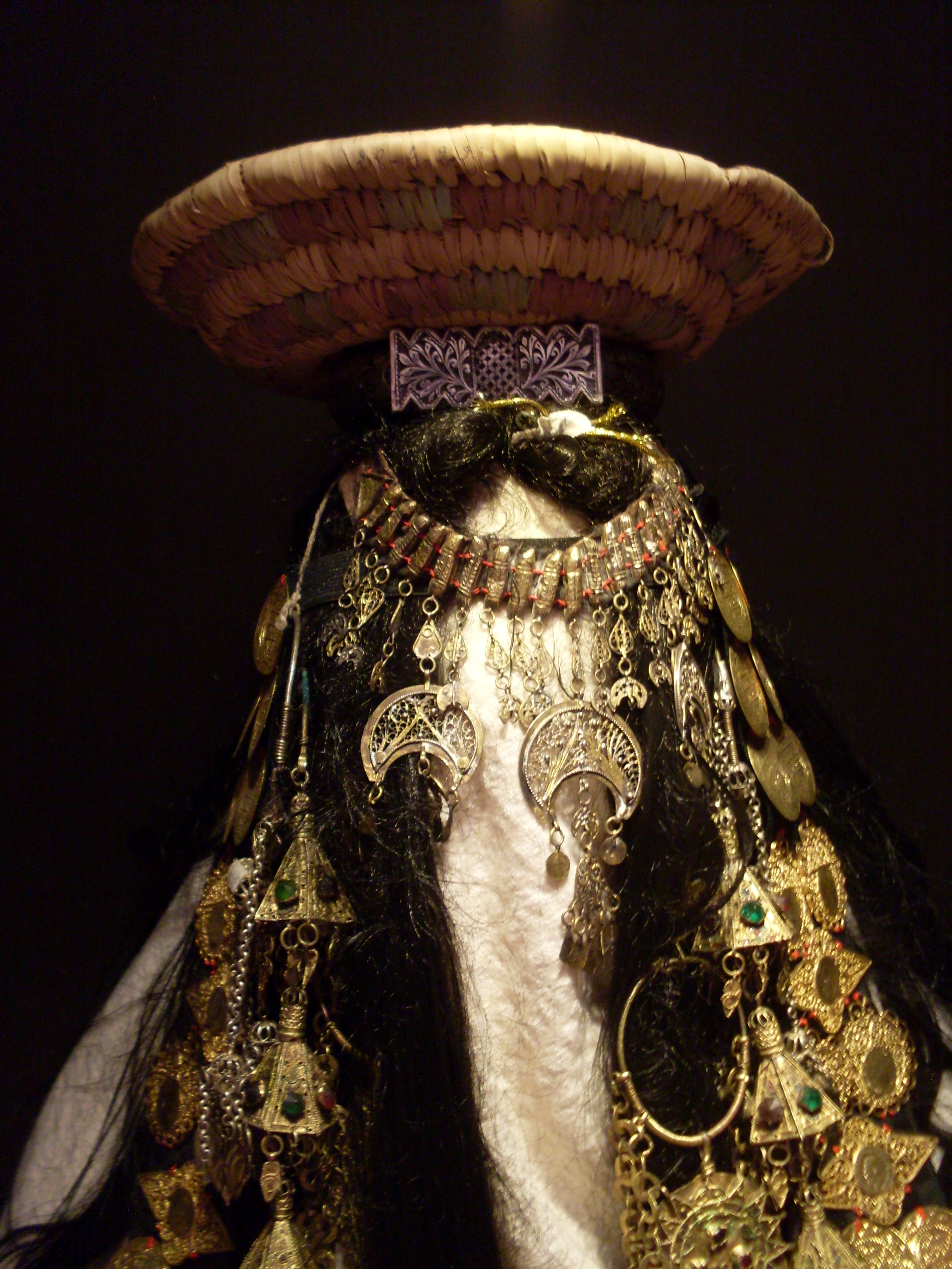 Tunisie, Djerba, Musée du patrimoine traditionnelTunisie, Djerba, musée du patrimoine traditionelle